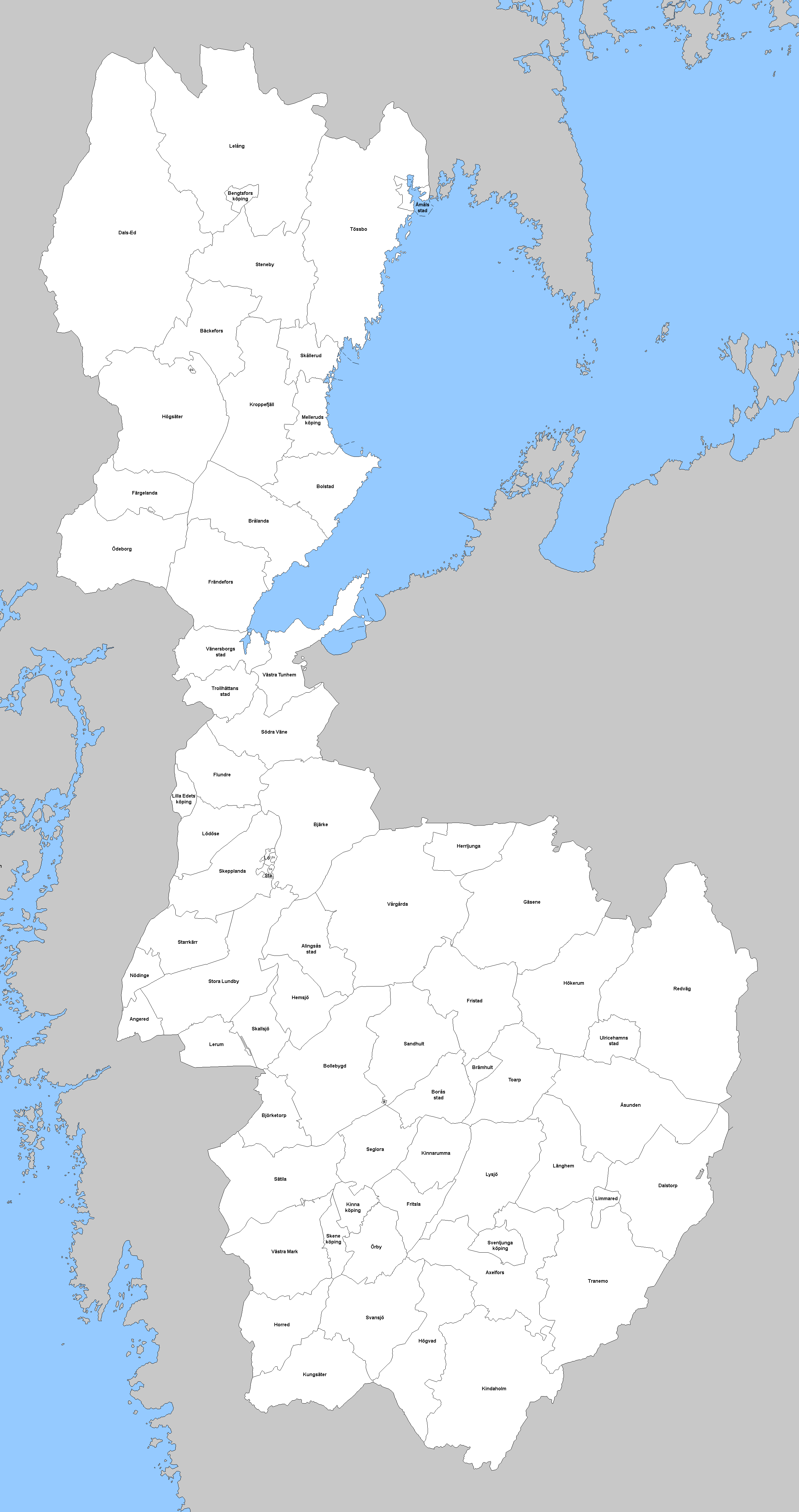 Älvsborgs läns kommuner den 1 januari 1952